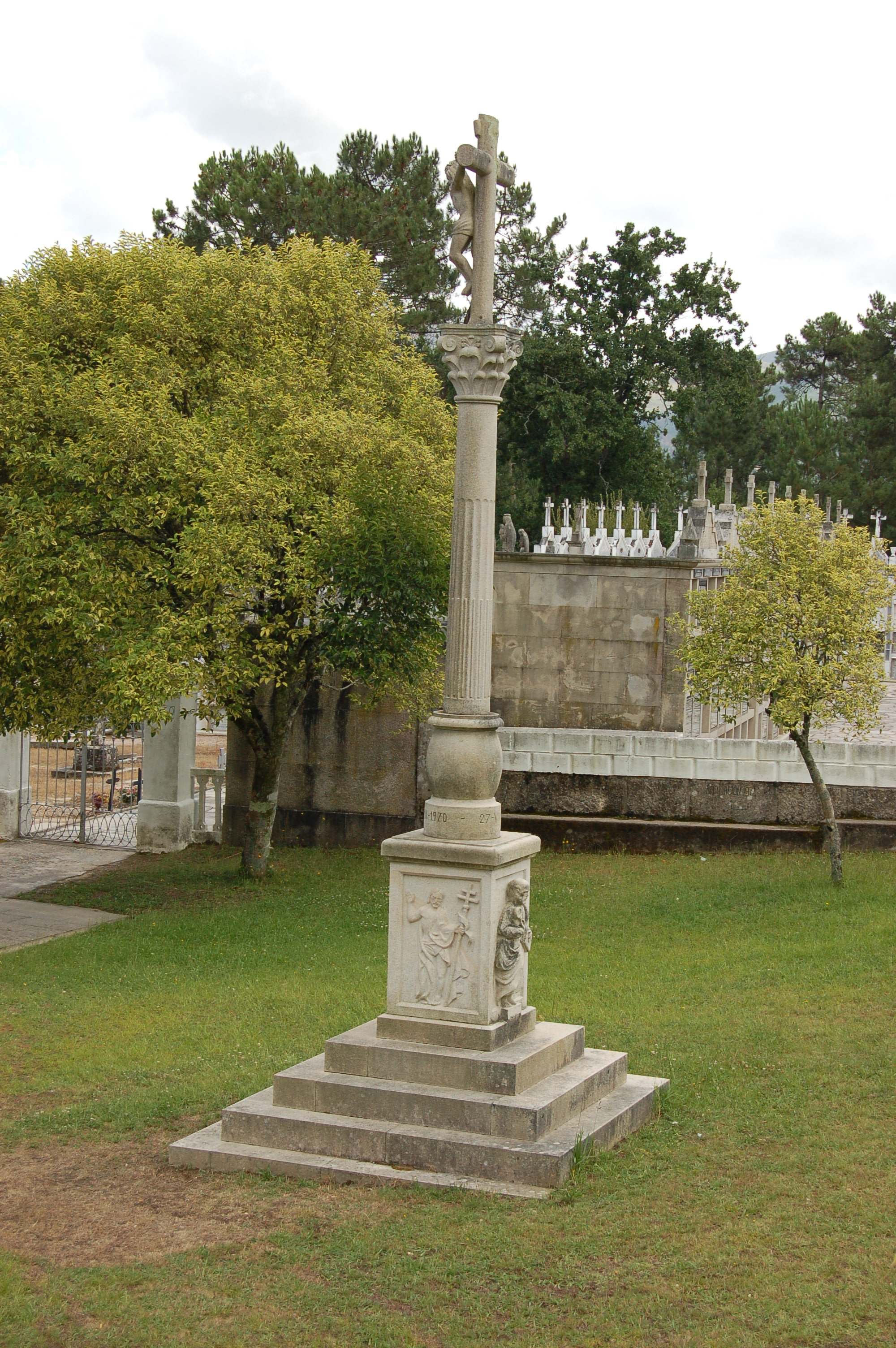 Cruceiro en Forcadela (Tomiño). Inaugurado o 27 de agosto de 1995 segundo consta na súa base. Ten no pé un releve de San Pedro.